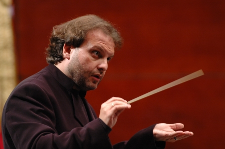 músico compositor y director